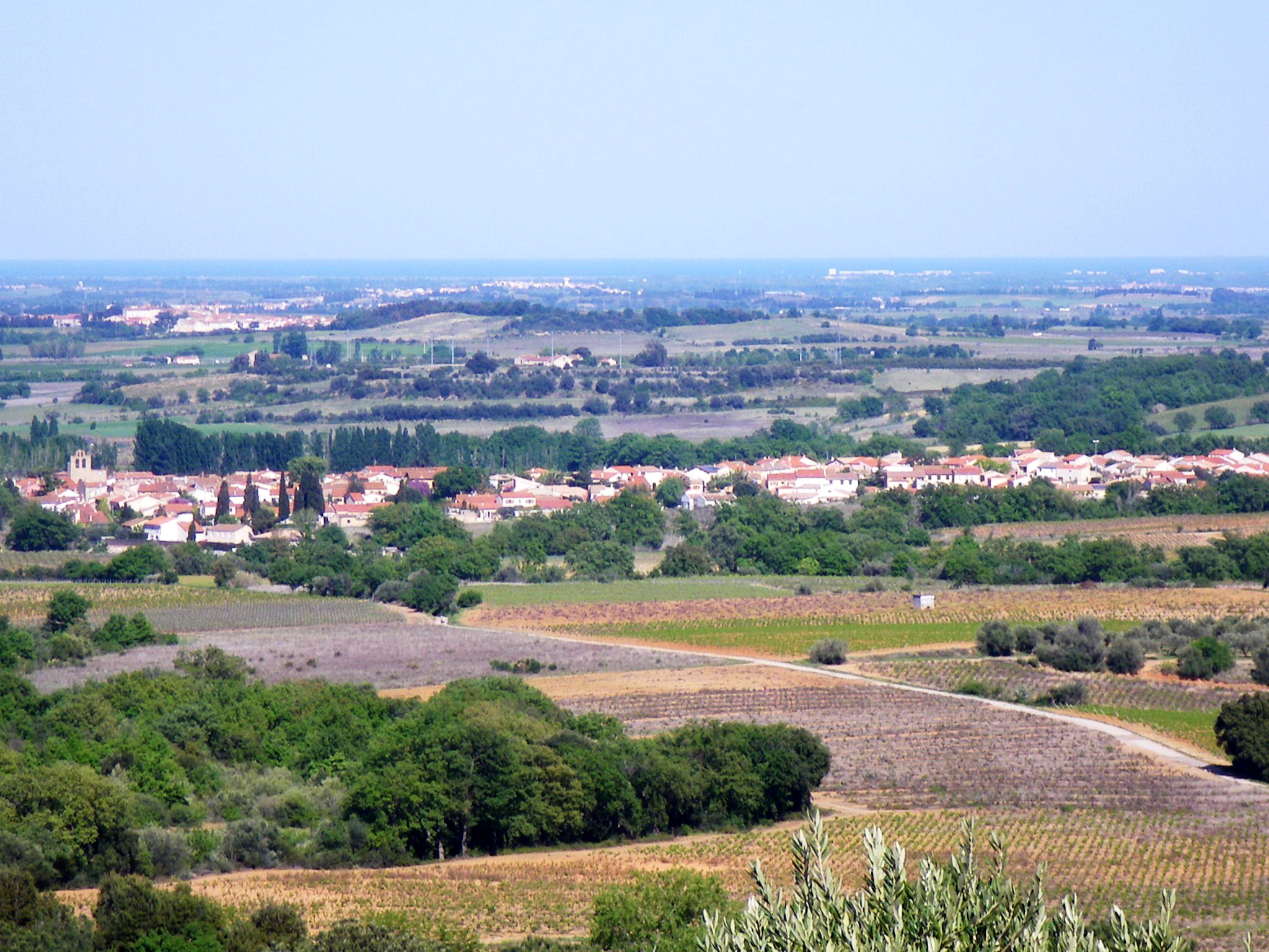 Vue générale